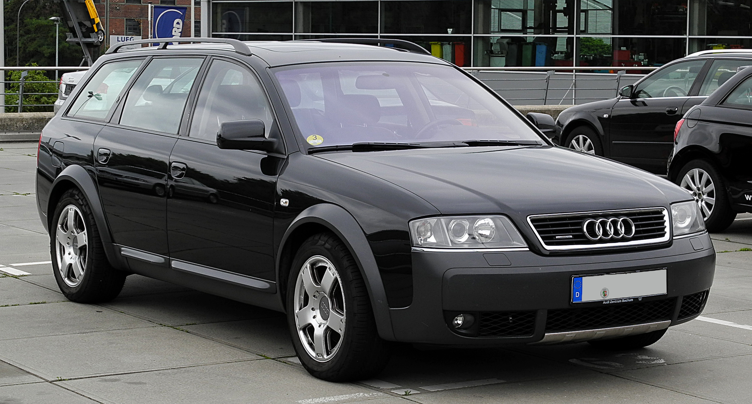 Audi allroad quattro 2.5 TDI (C5, Facelift)